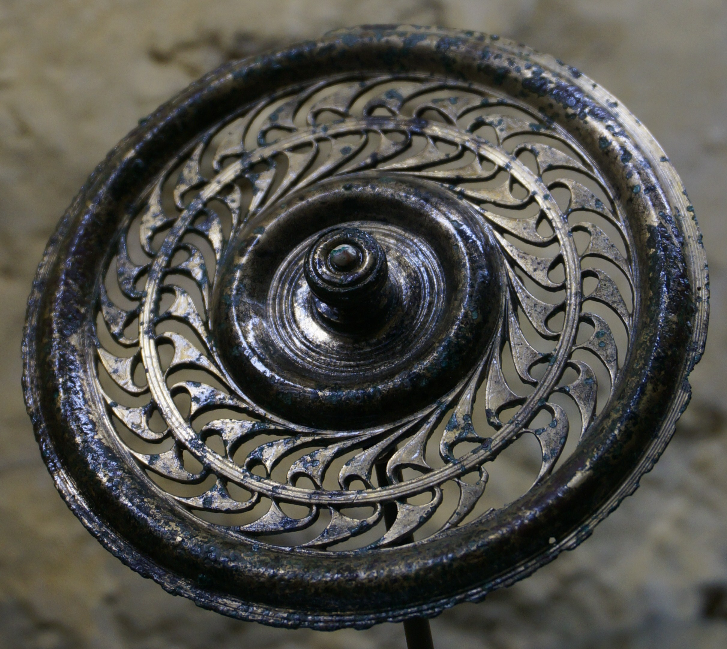 Phalère du Ve siècle avant JC, tombe à char de Bourcq .